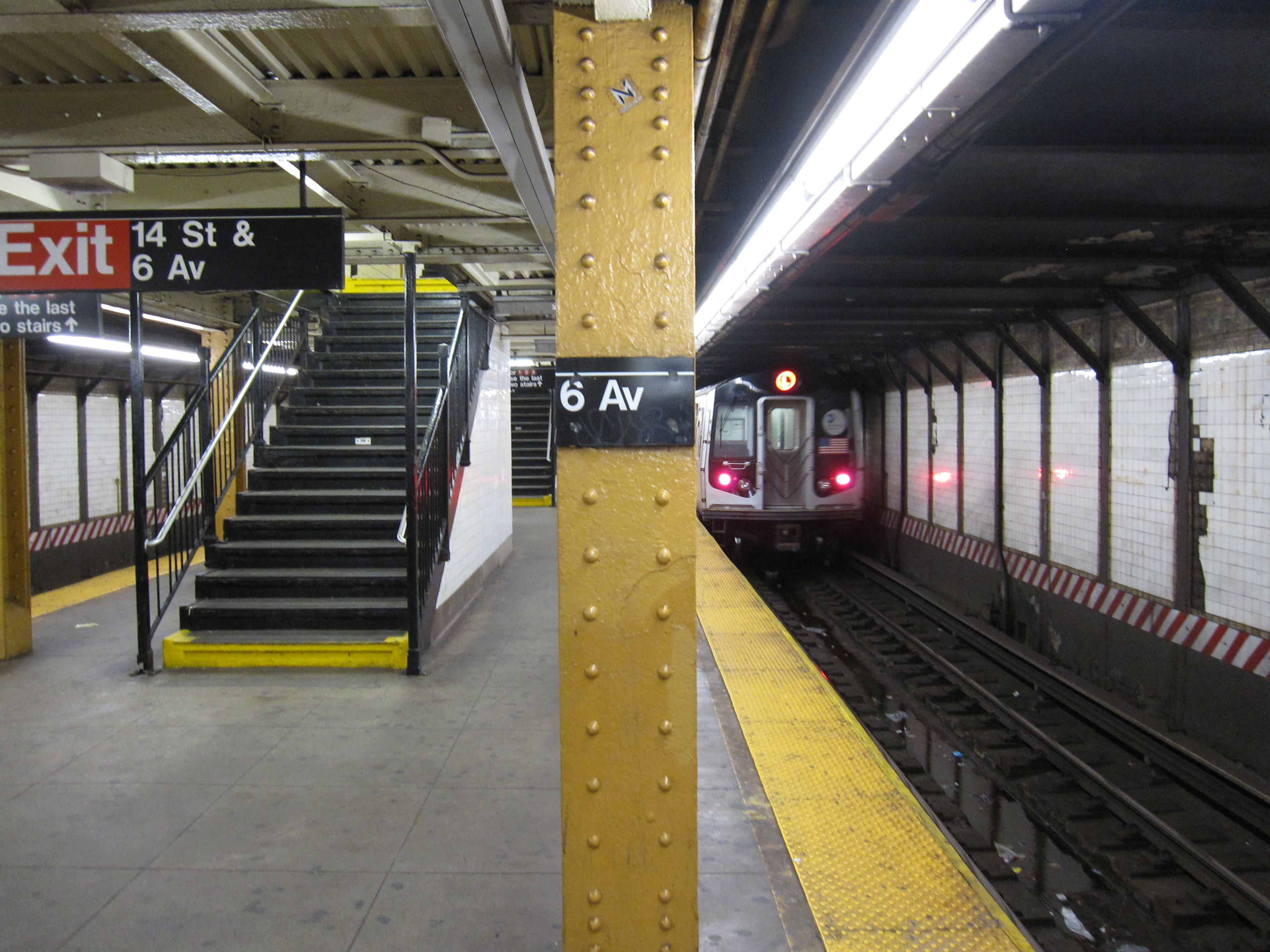 Sixth Avenue (BMT Canarsie Line)